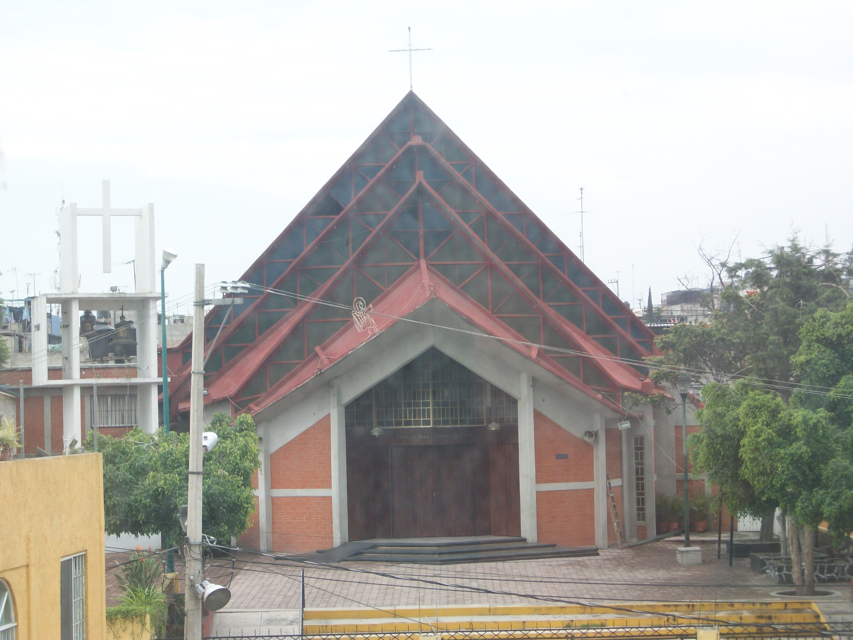 Iglesia en san andres tomatlan